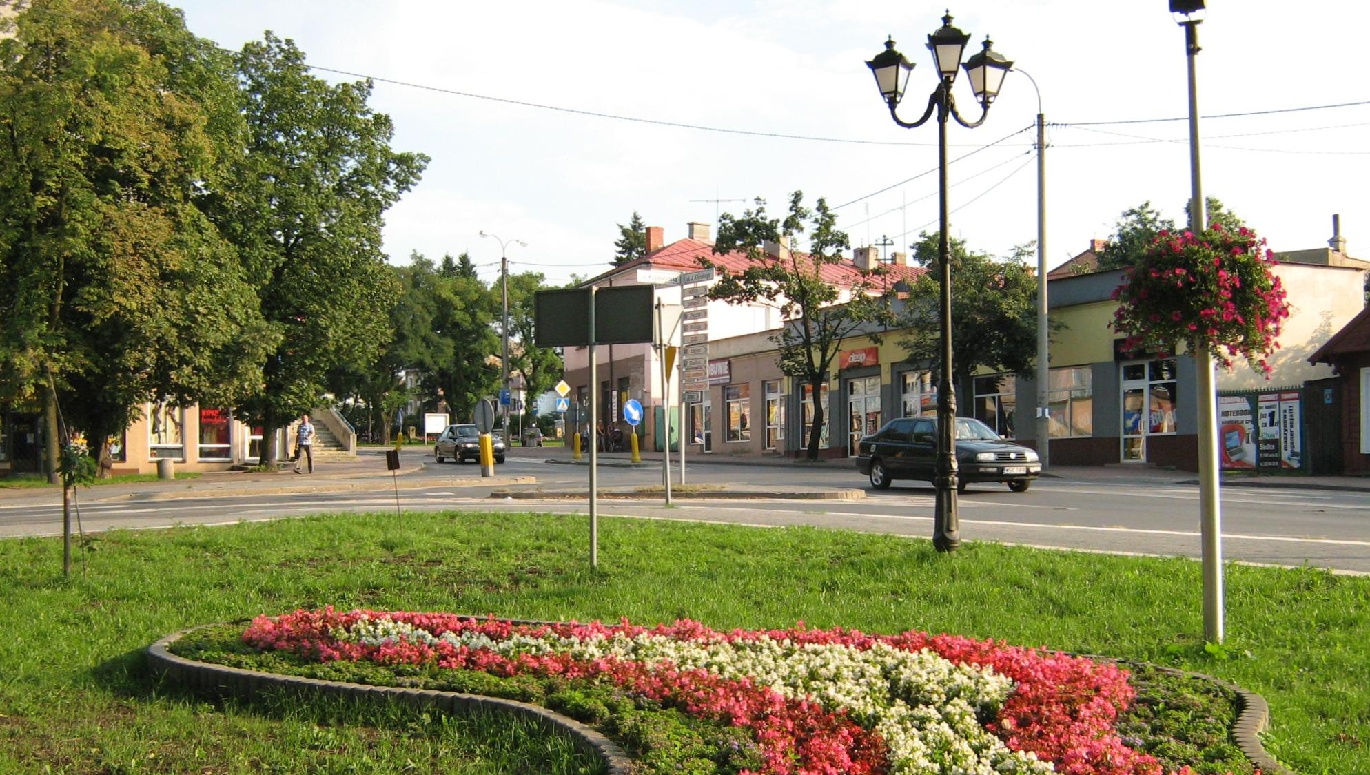 Sokołów Podlaski. Skwer im. Najświętszej Marii Panny.